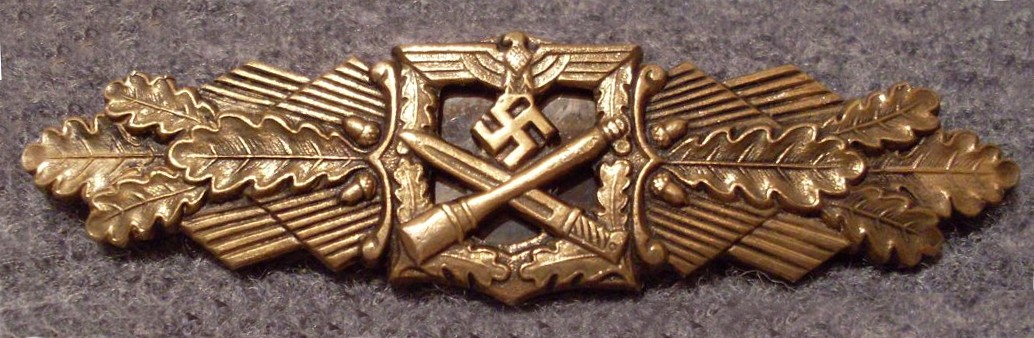 Deutsche Militärauszeichnung im Zweiten Weltkrieg, Wehrmacht, Heer, Infanterie 1. Stufe «Nahkampfspange» (Silber) 15 Nahkampftage.